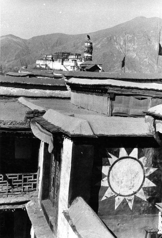 Lhasa, Haus mit Glückszeichen (Sonne)